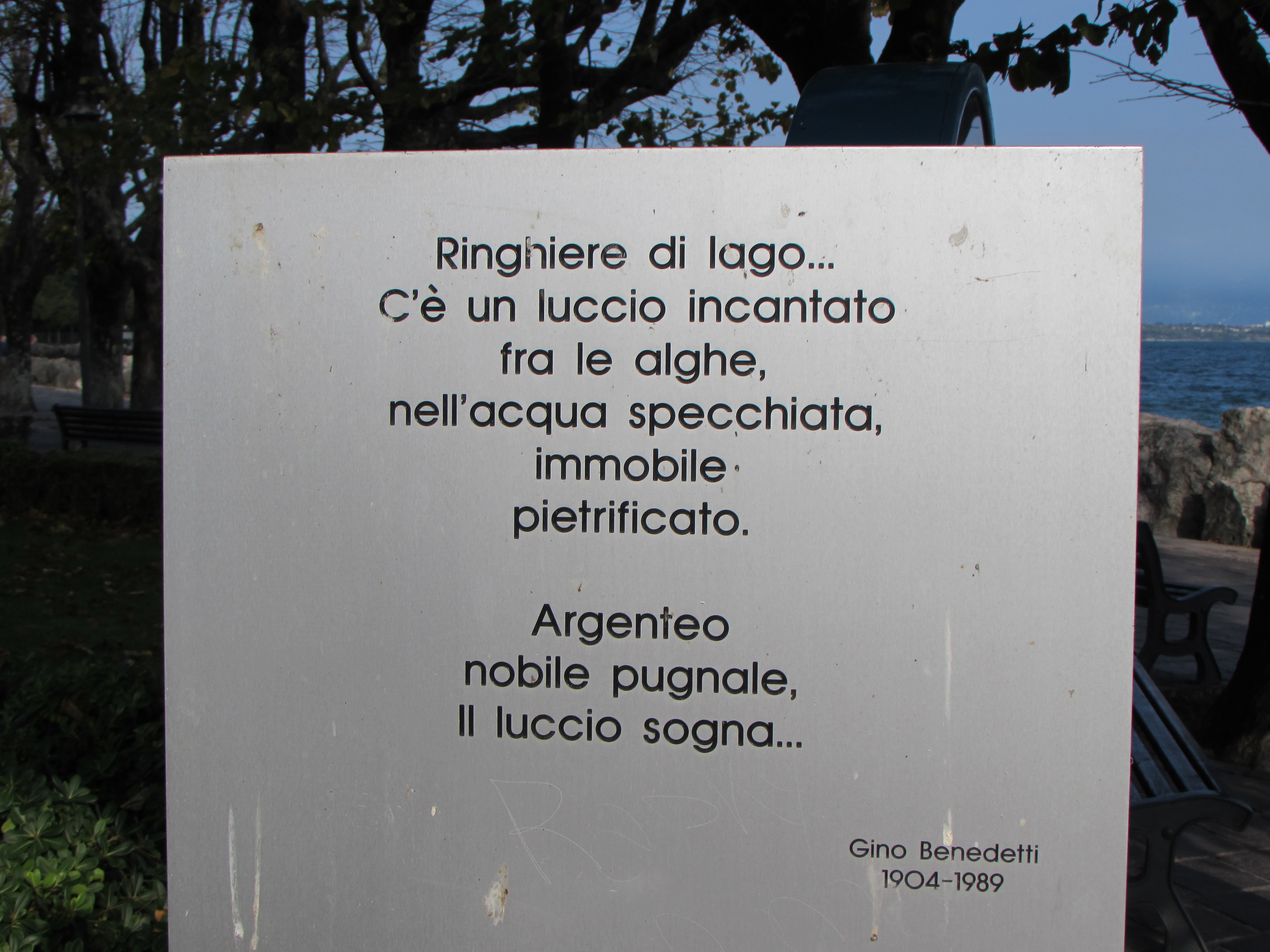 Poesia dedicata al luccio a Desenzano del Garda